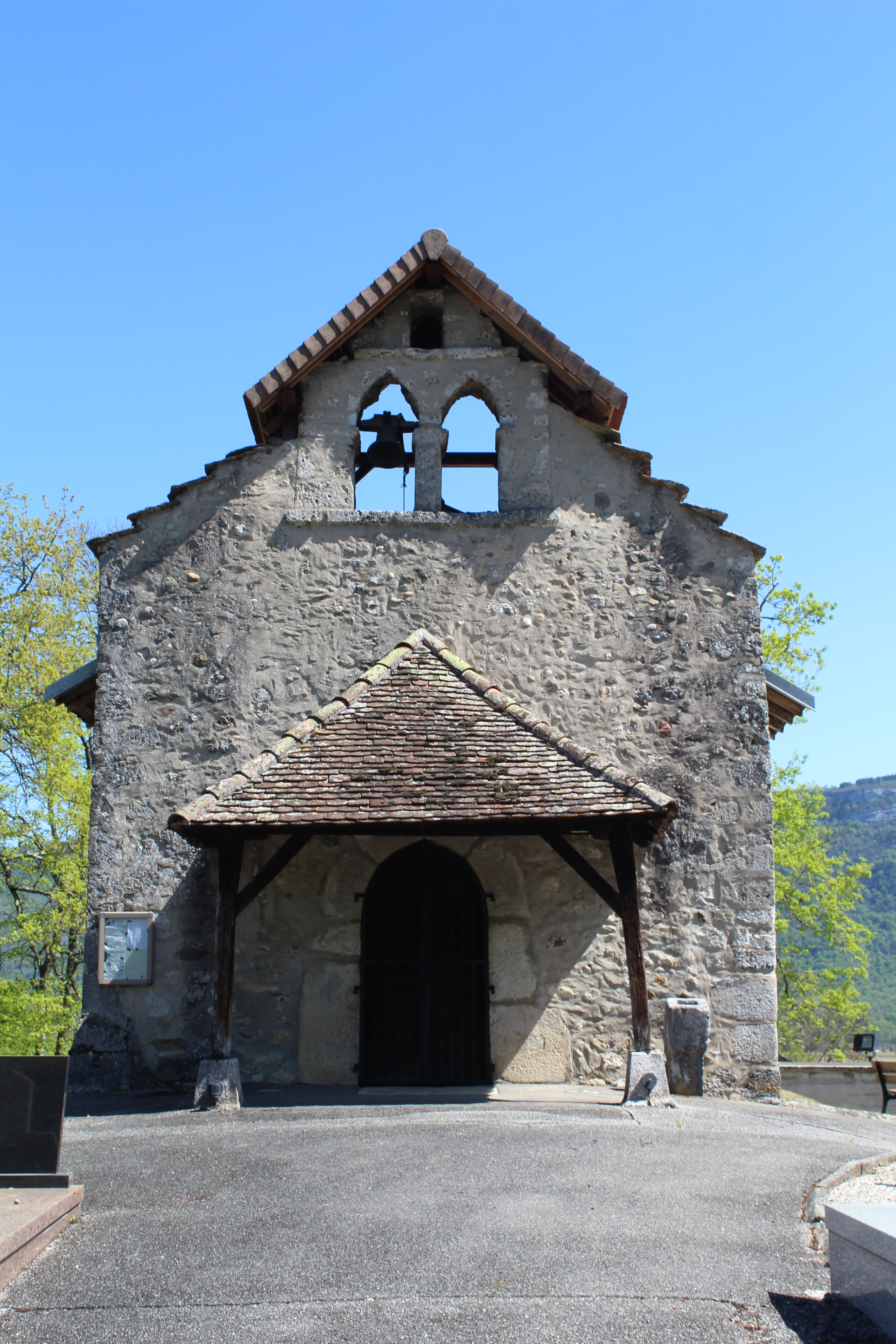 Église Saint-Michel de Brens, Ain.